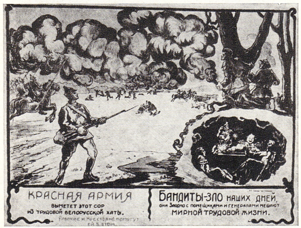 Плакат Змудзінскага